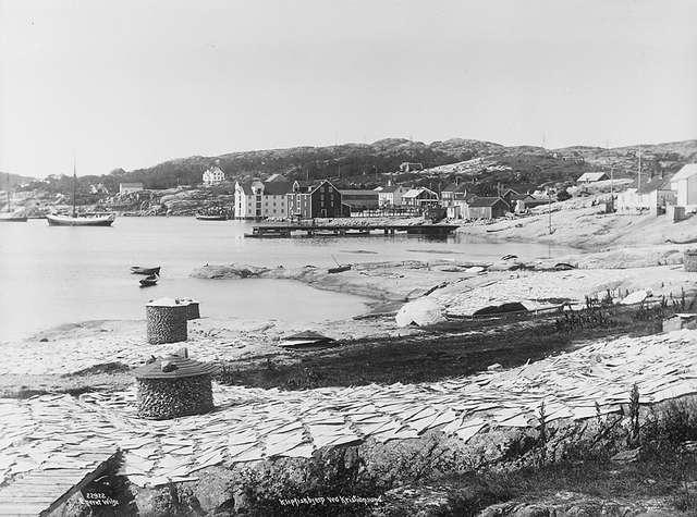 Klippfisk tørkes på berg i Kristiansund, Nordlandet.